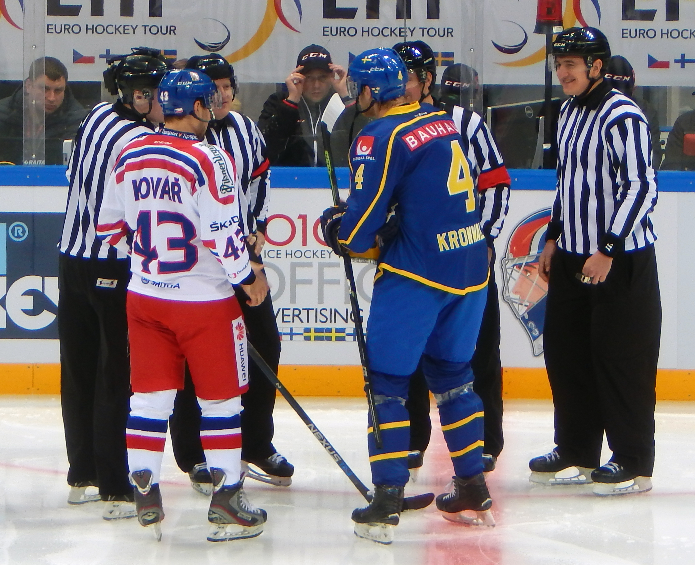 Капитаны своих команд Коварж и Крунвалль перед началом матча между Чехией и Швецией